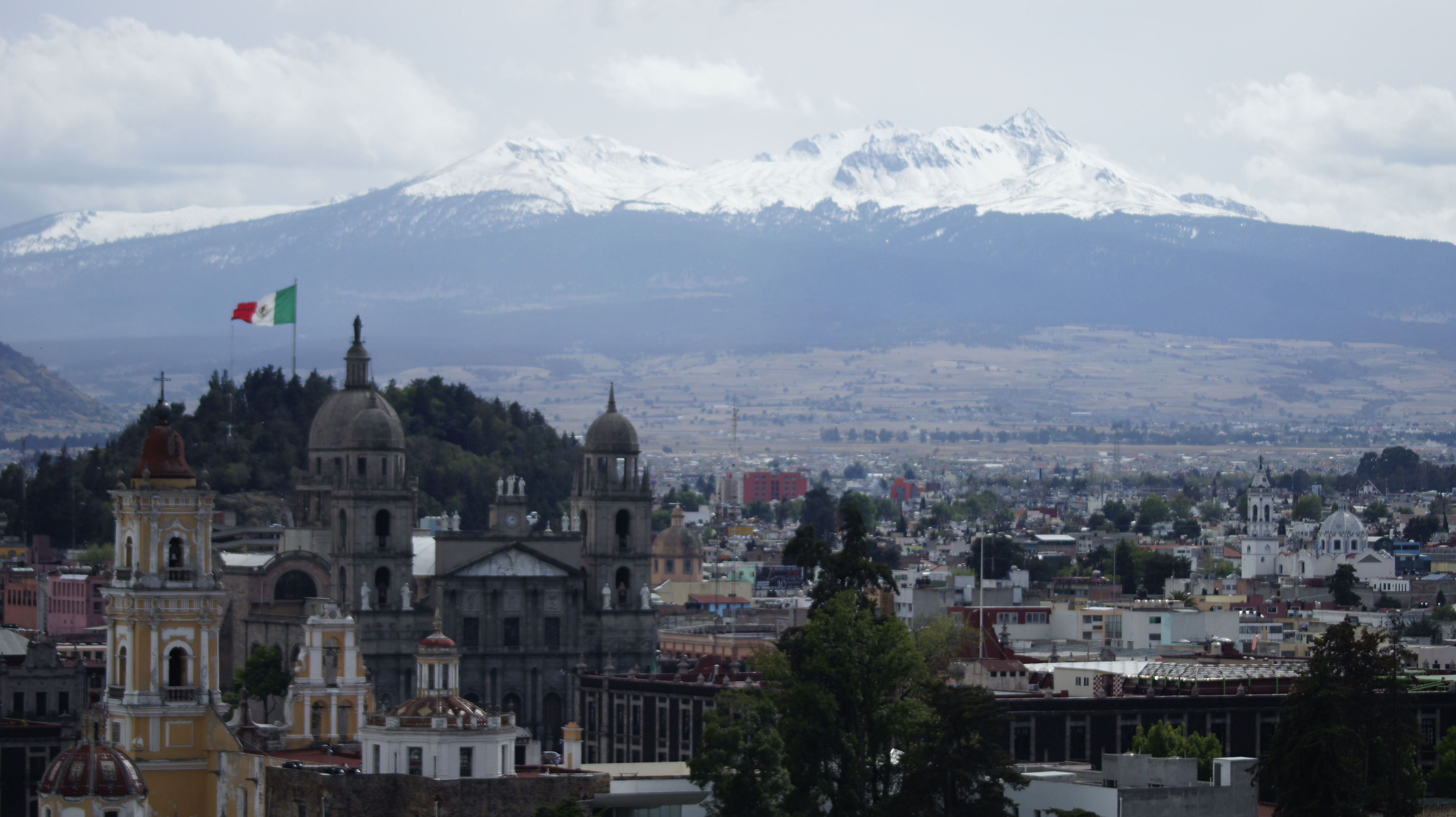 Toluca a los pies del nevado